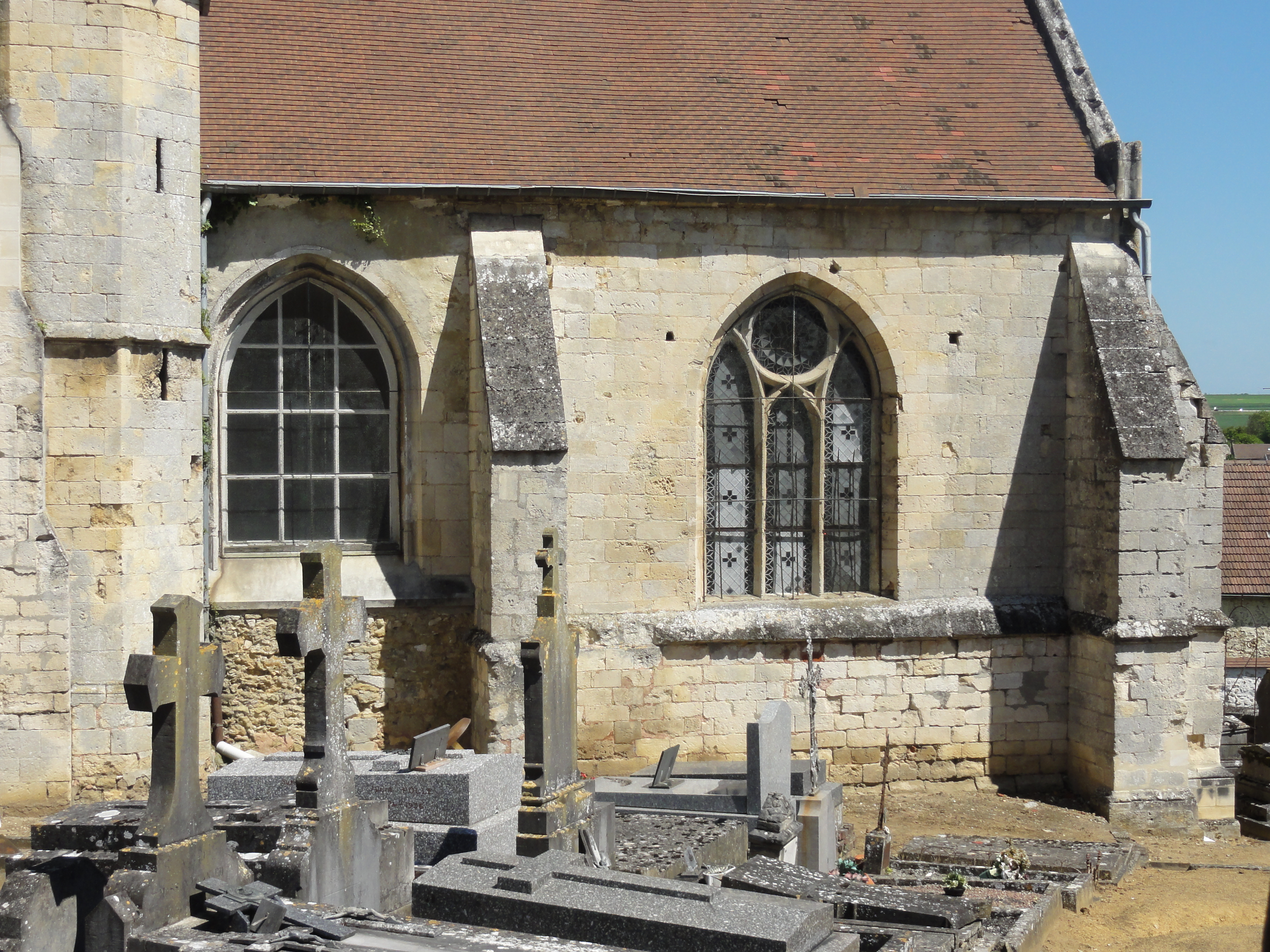 Collatéral sud du chœur.